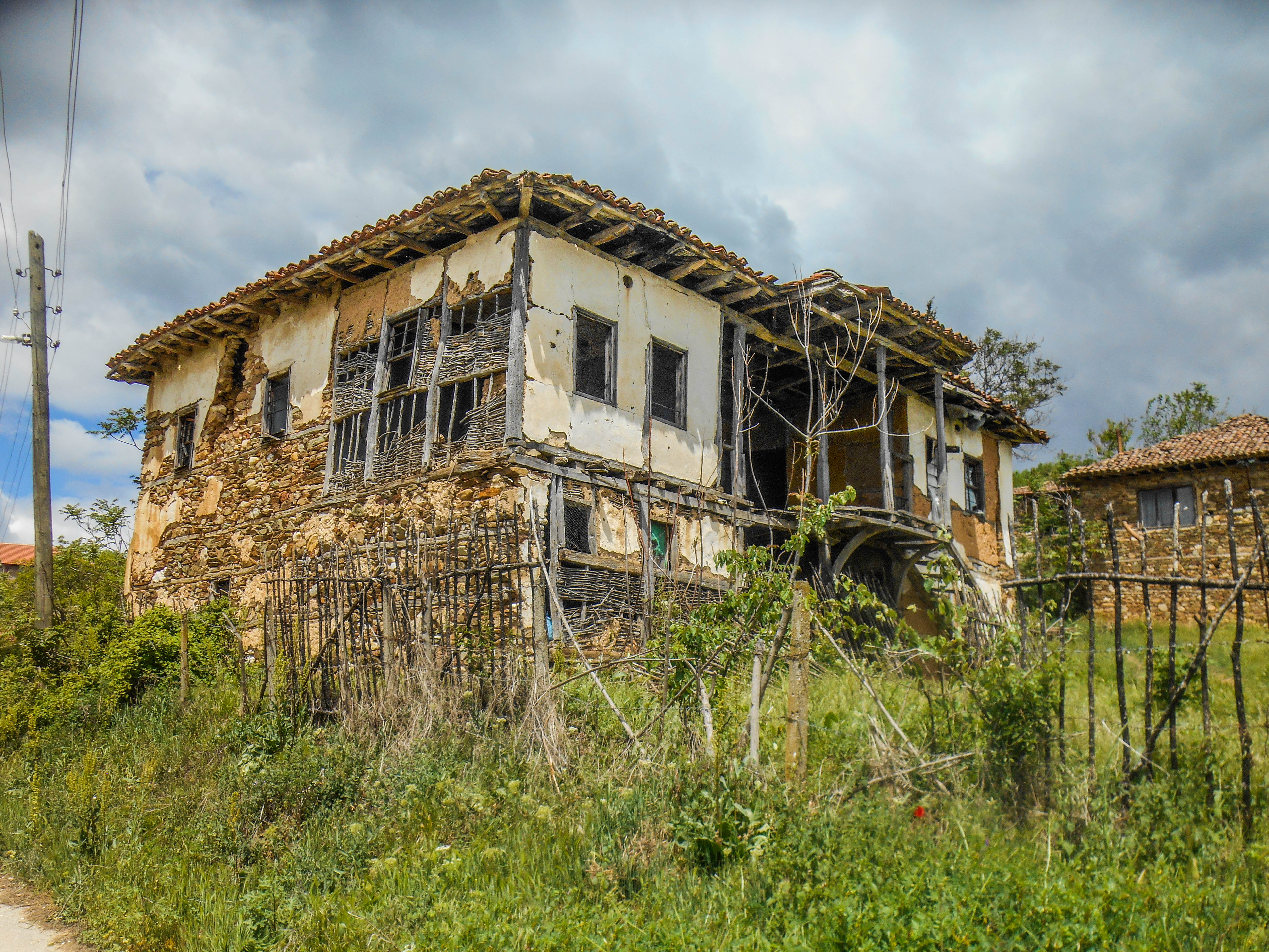 Куќа во Требичино